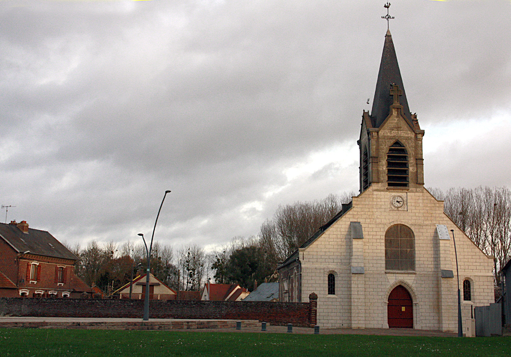 Place de l'église